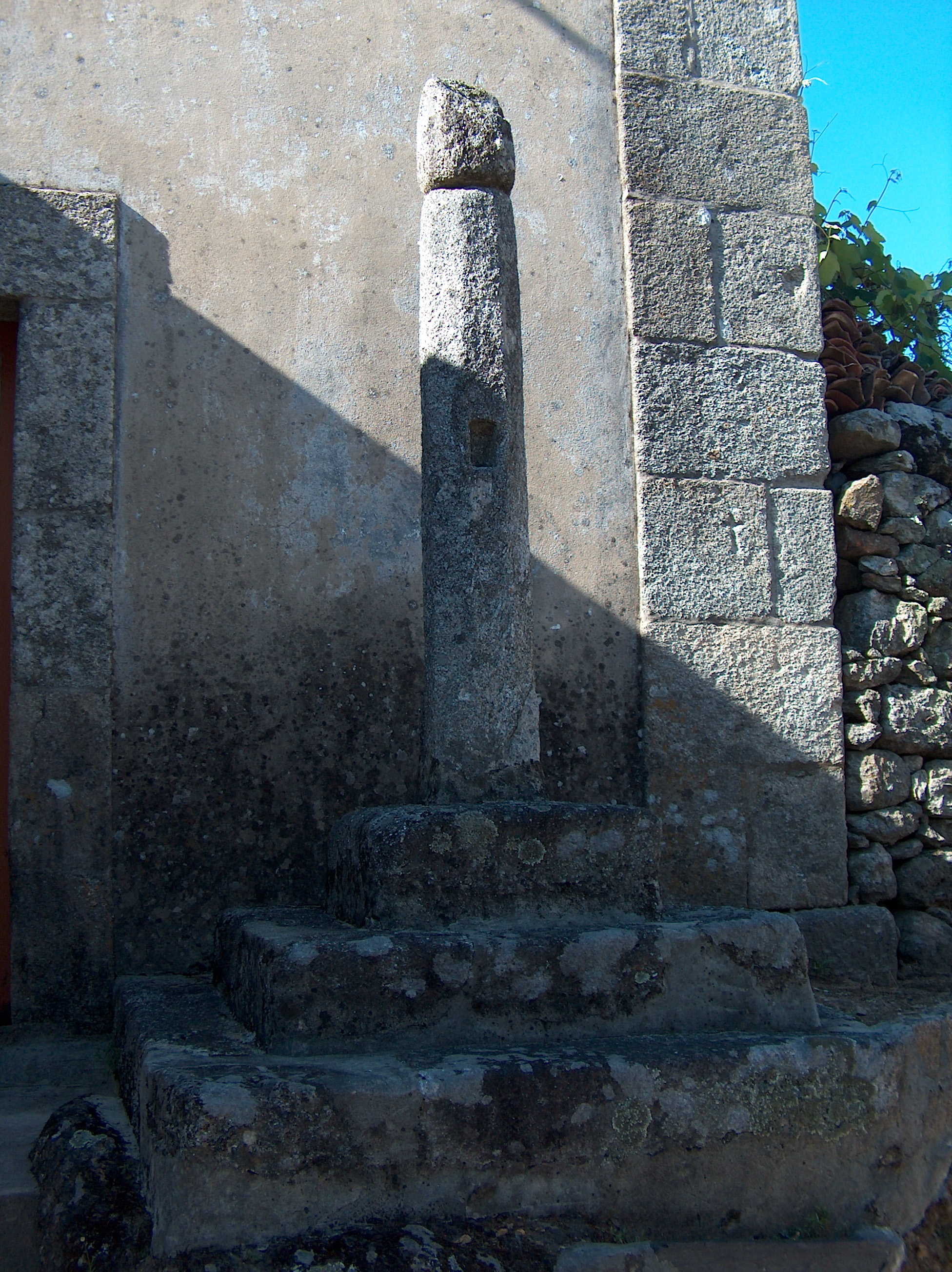 Descrição Pelourinho (Couto de Esteves) Fonte Carregada pelo autor Autor João Carvalho